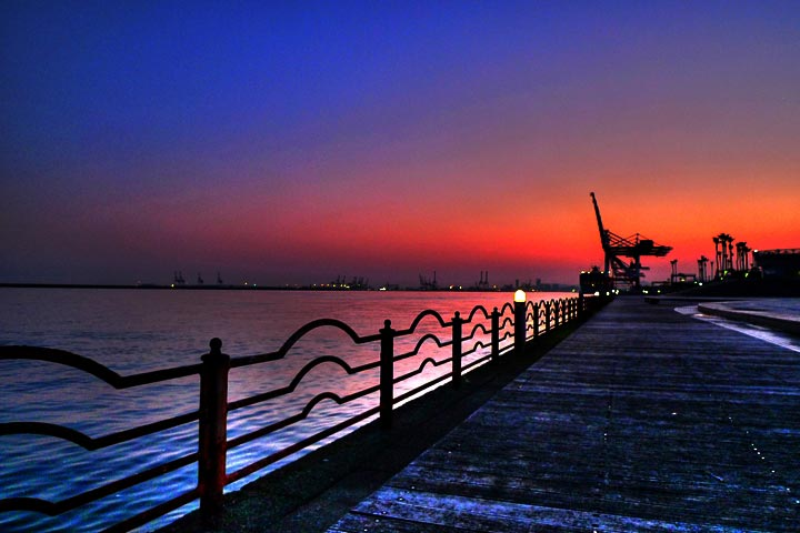 Coastline：海岸線